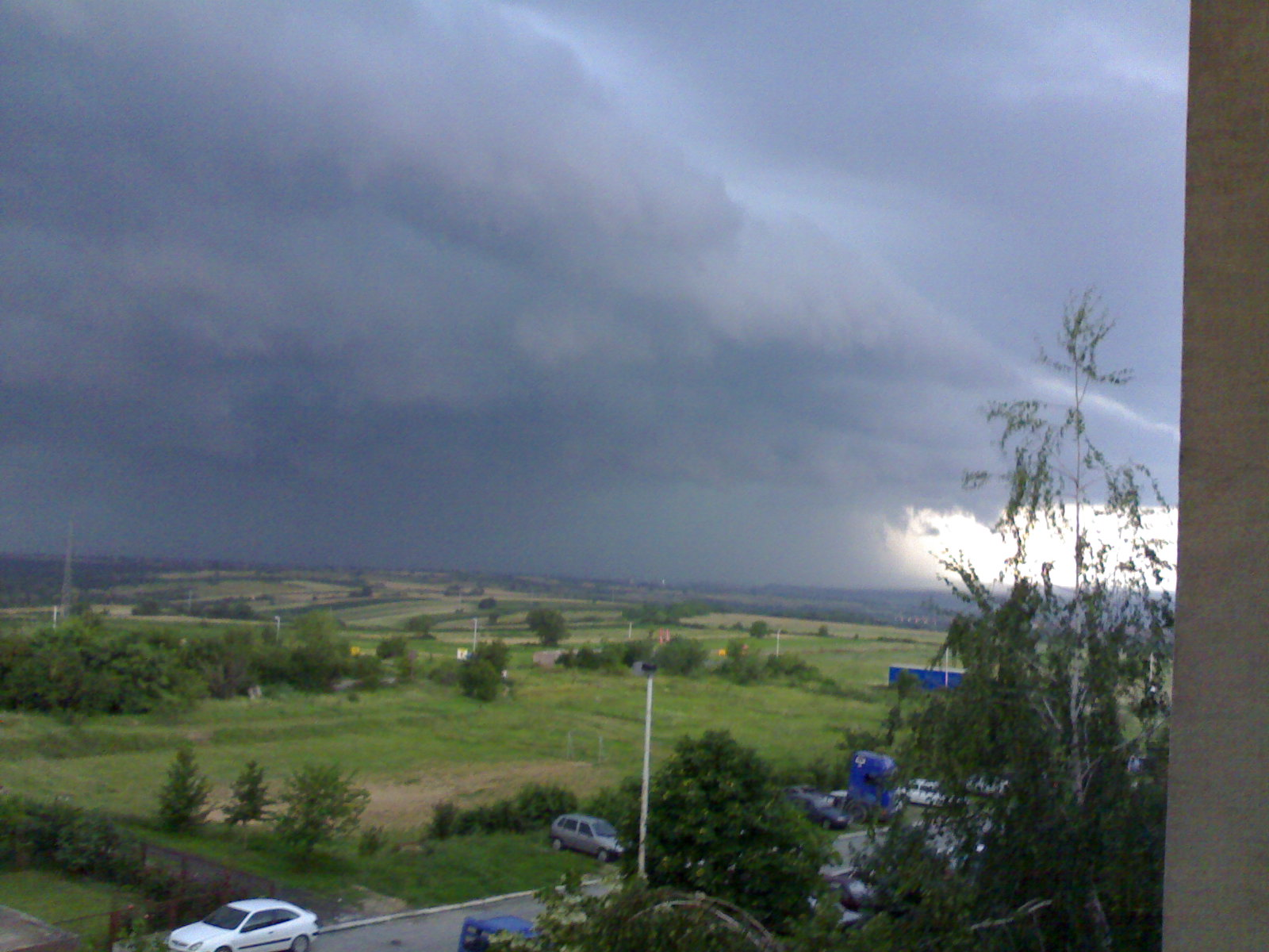 Невреме у Београду, сликано 8. 7. 2009. године.